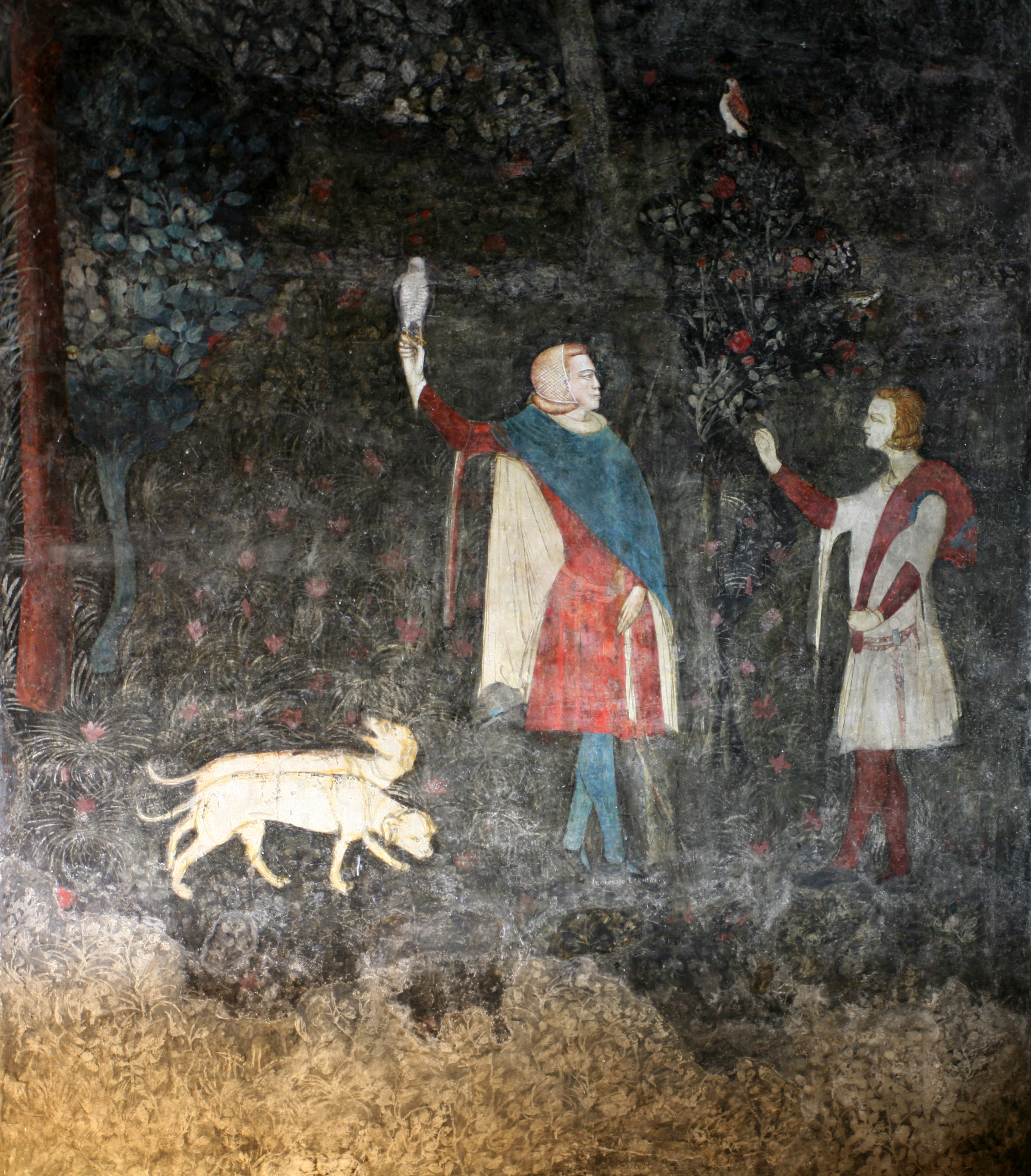 chambre du cerf - le frère du pape à la chasse, Palais des Papes, Avignon, Vaucluse, France.